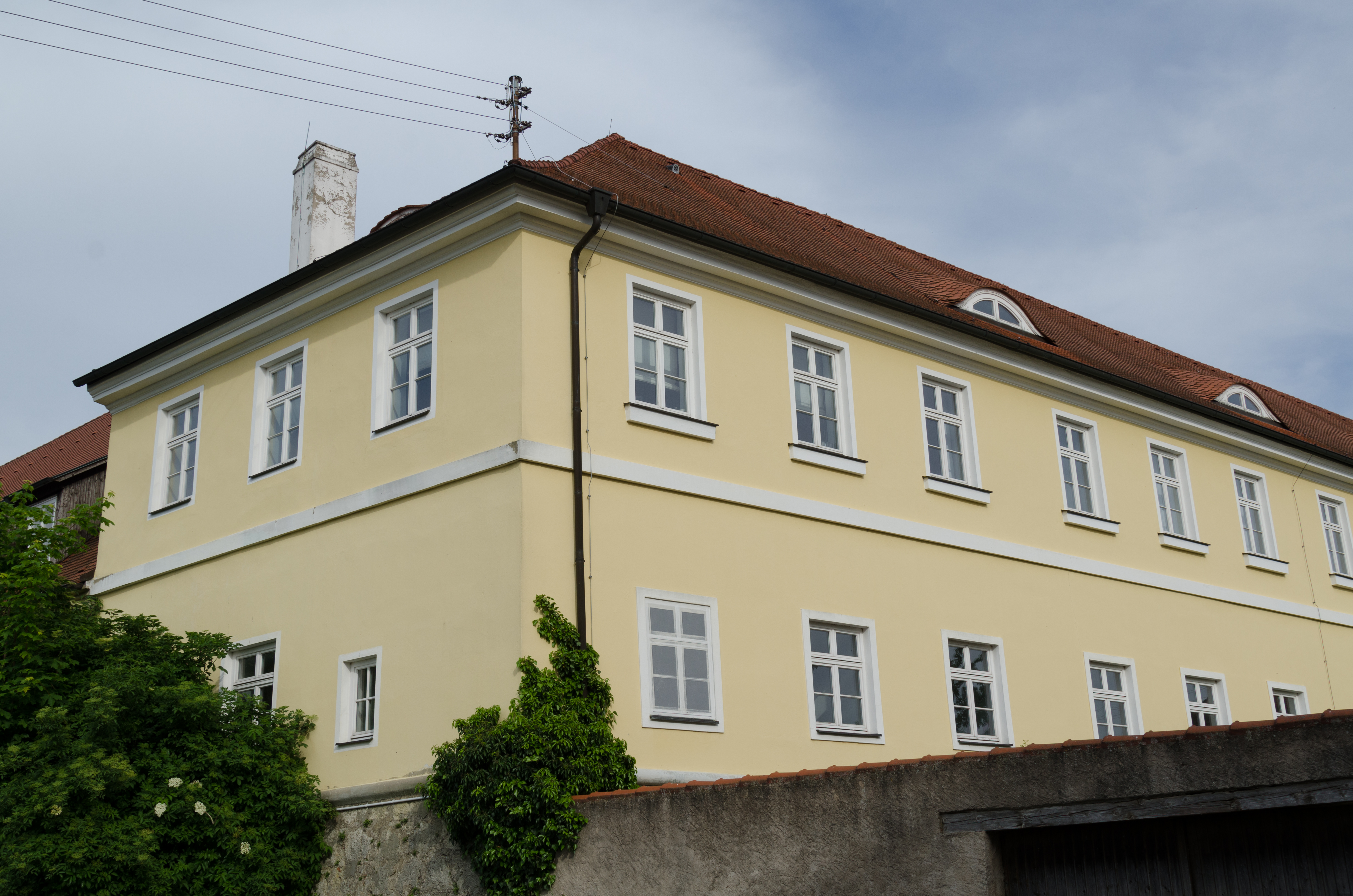 Wallerstein, Berg 78